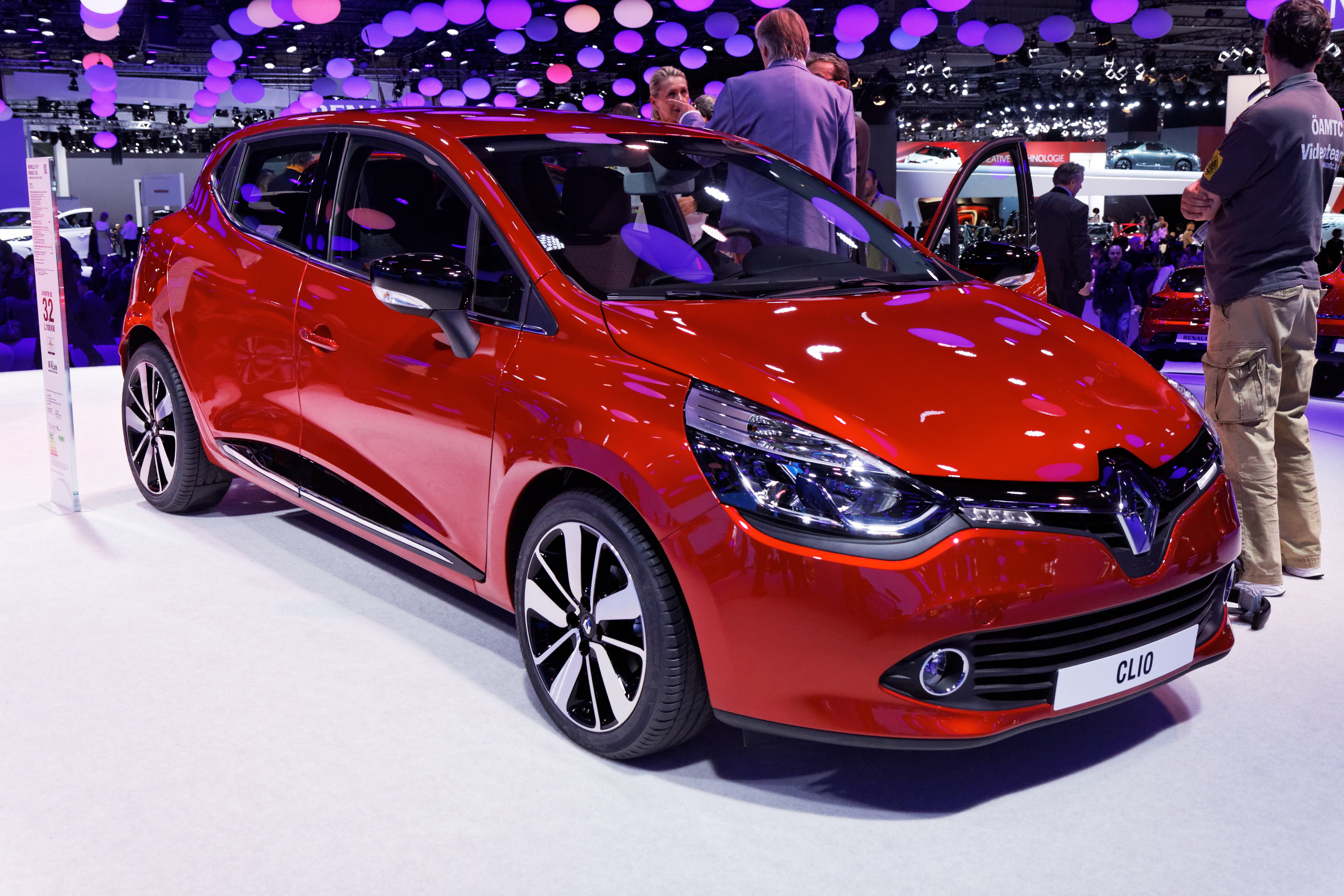 Une Renault Clio présentée lors du Mondial de l'Automobile de Paris 2012.